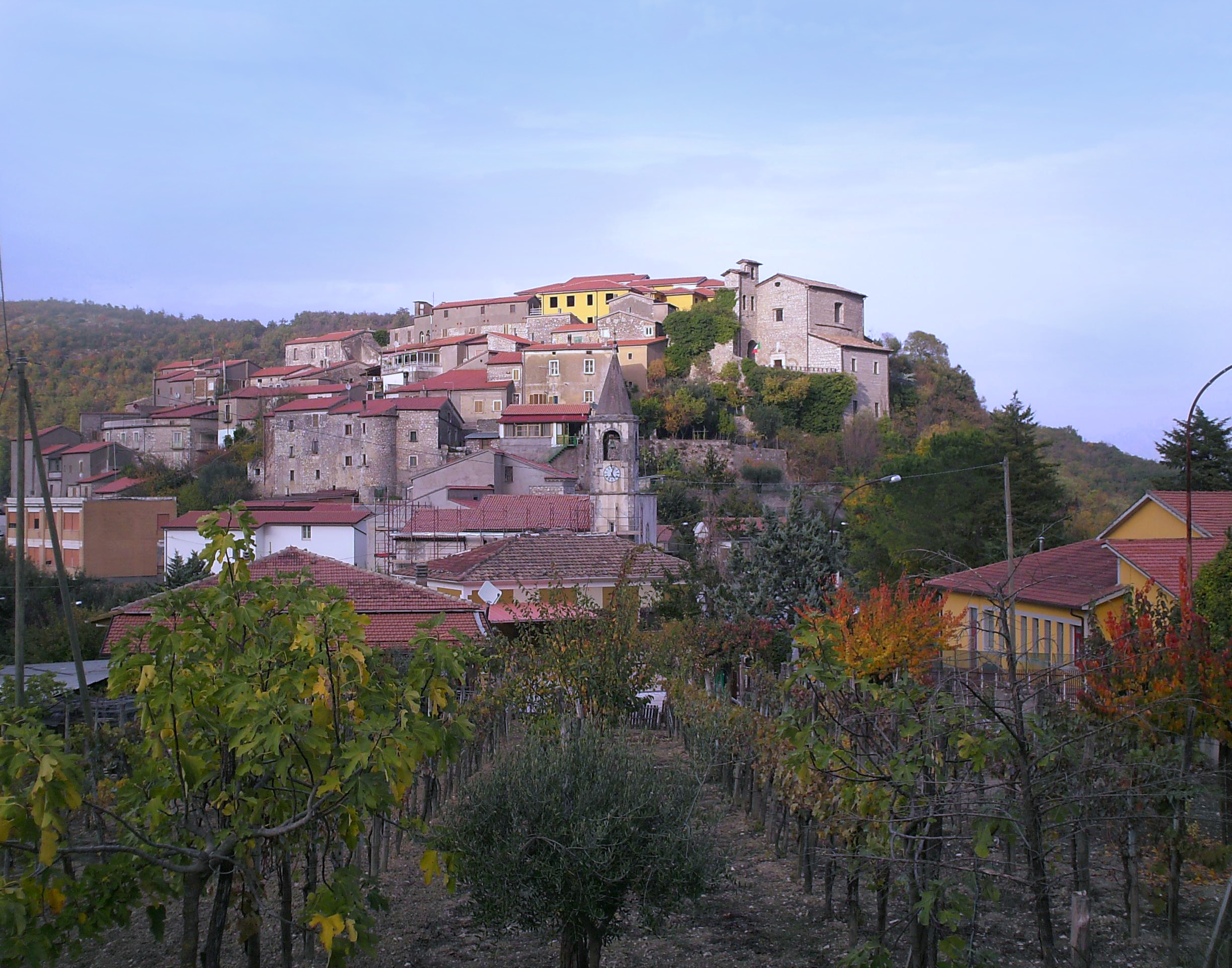 Vallemaio FR